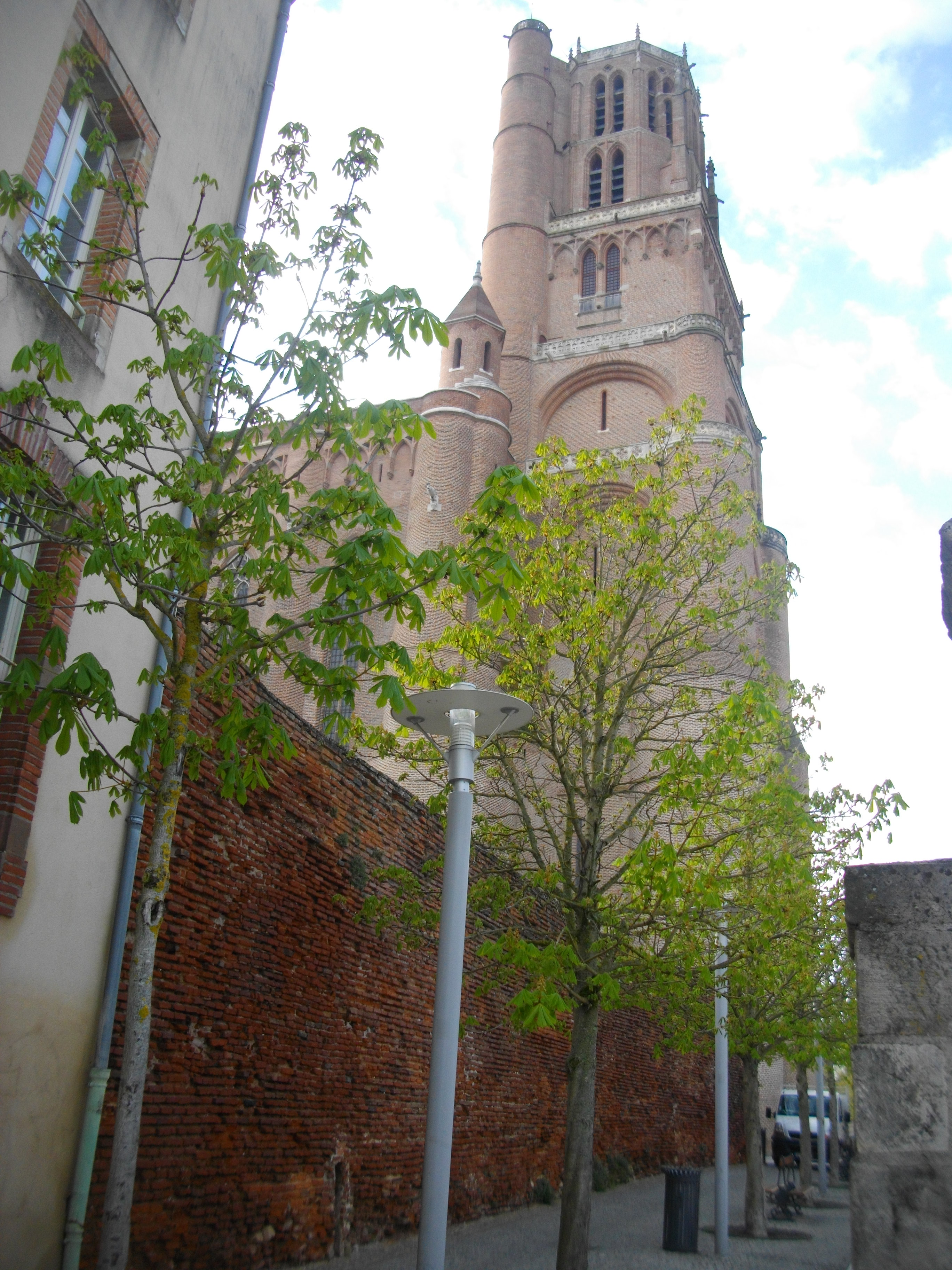 Vestige de l'ancien mur des chanoines qui enserrait les membres du chapitre de la cathédrale dans l'enceinte de la cité épiscopale. En arrière-plan, le clocher de Sainte-Cécile